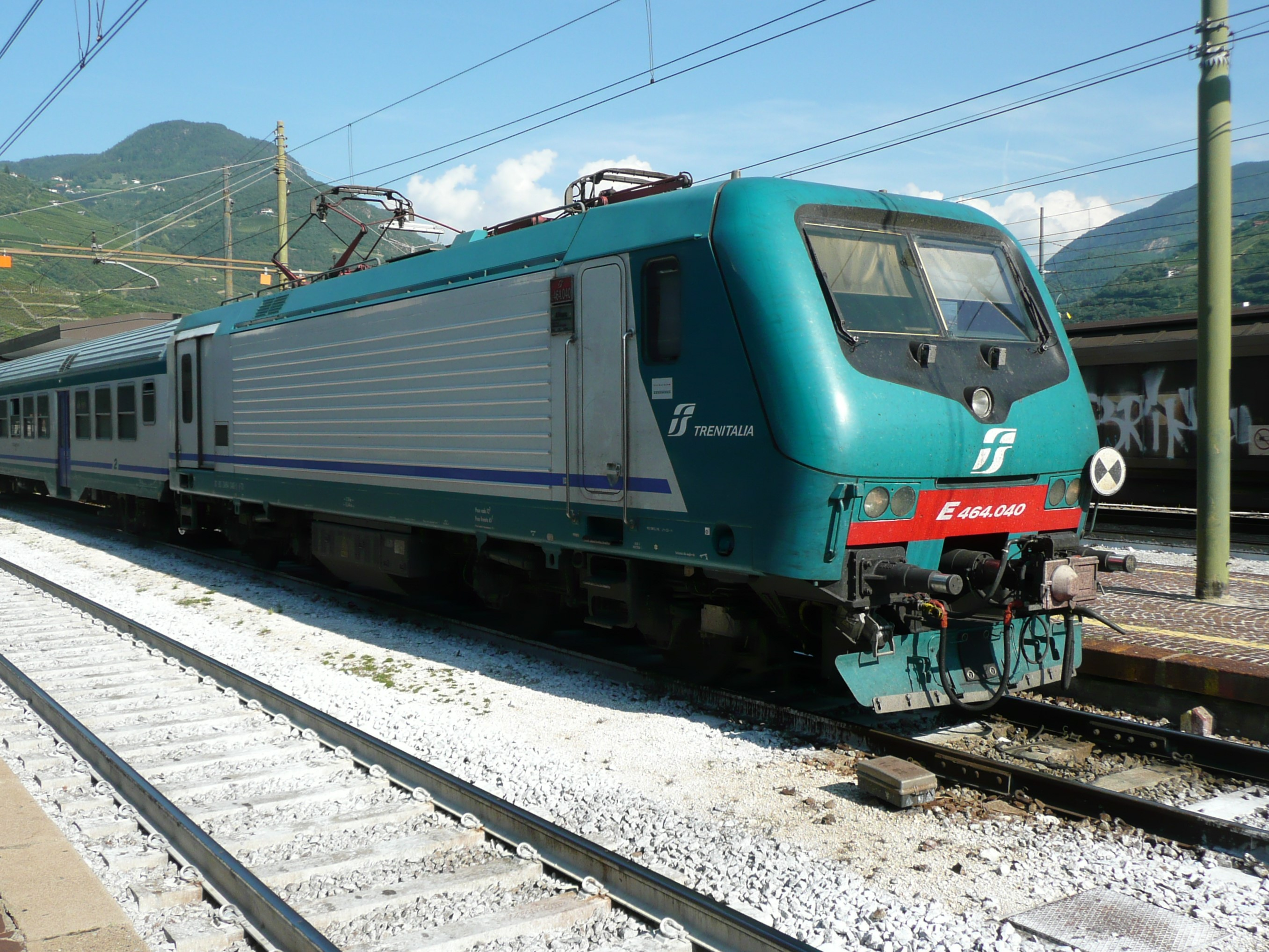 E 464 040 im Bahnhof Bozen